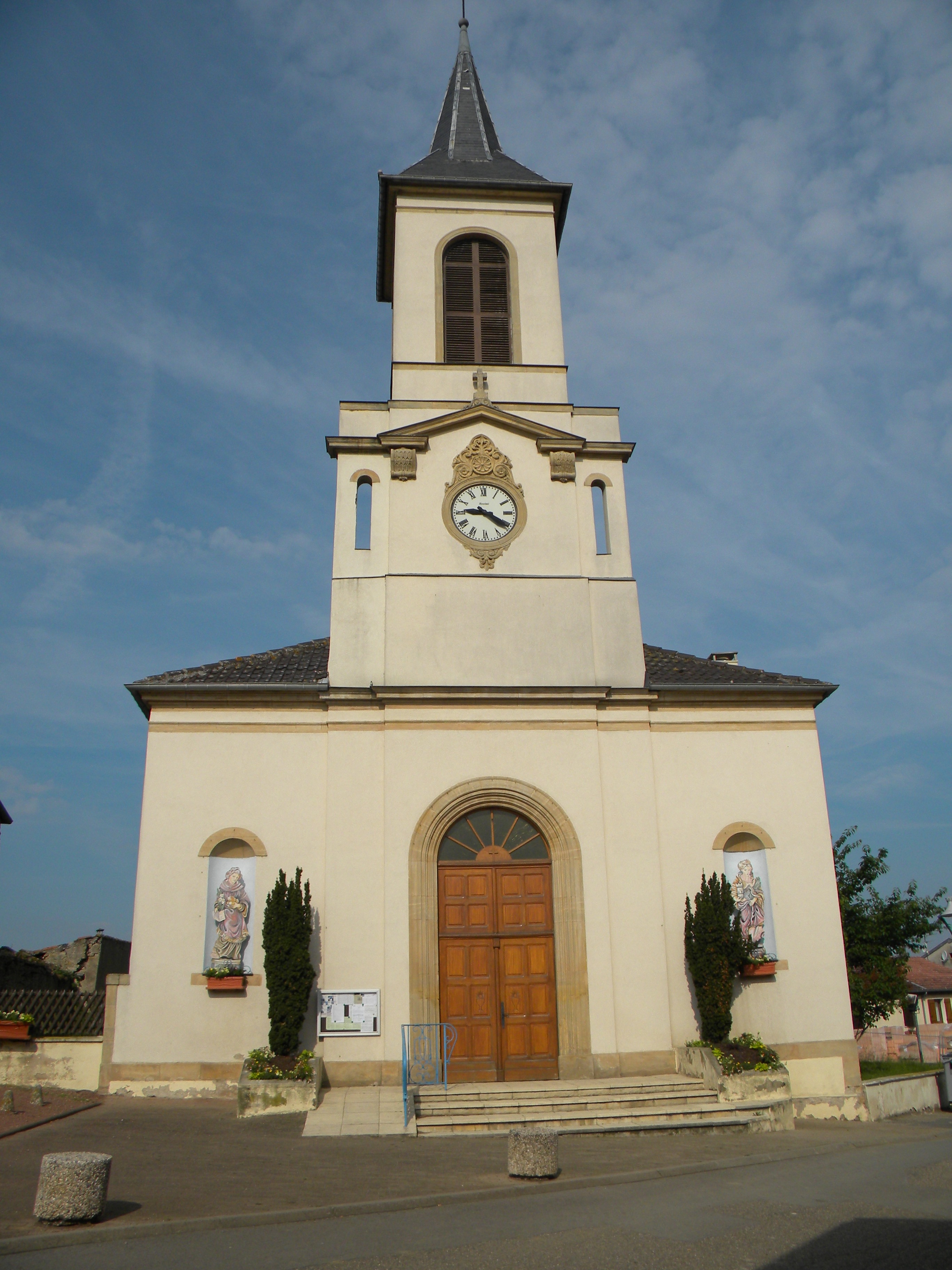 Preĝejo de Flévy